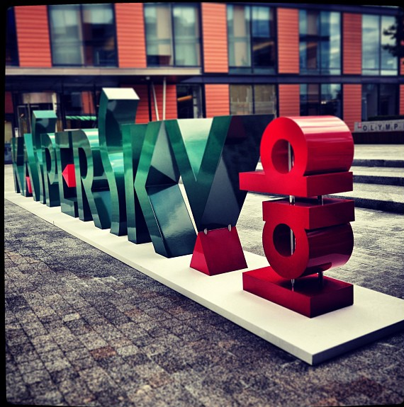 Volumétrico en la entrada de la recién inaugurada oficina de Kaspersky Lab, 2013.